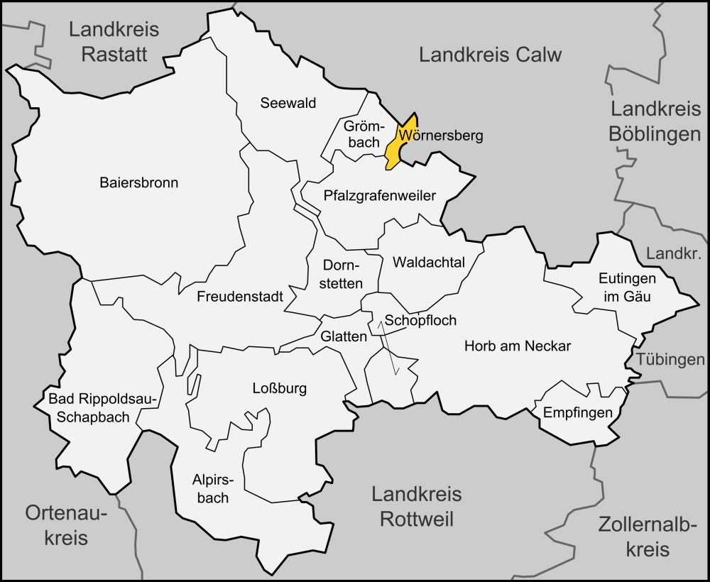 Karte der Gemeinde Wörnersberg im Landkreises Freudenstadt